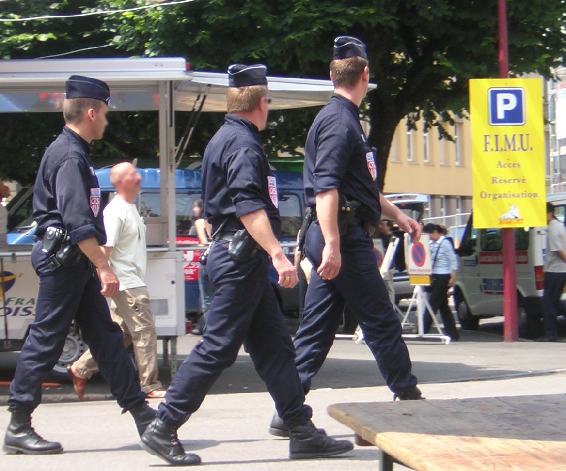 3 CRS